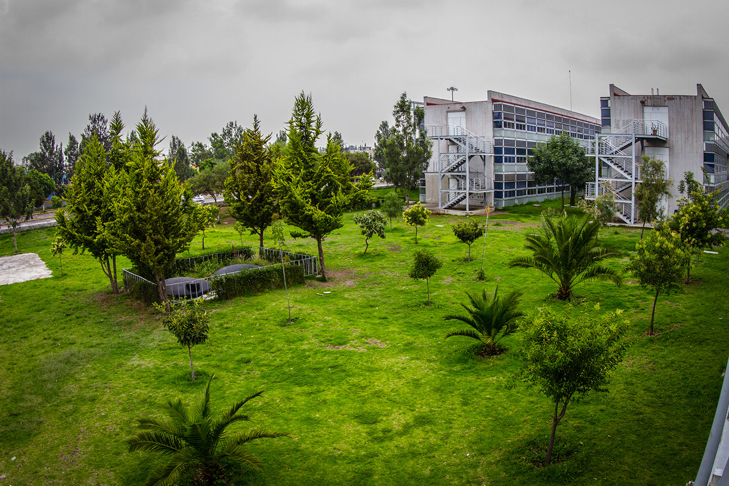 Plantel San Lorenzo Tezonco de la UACM